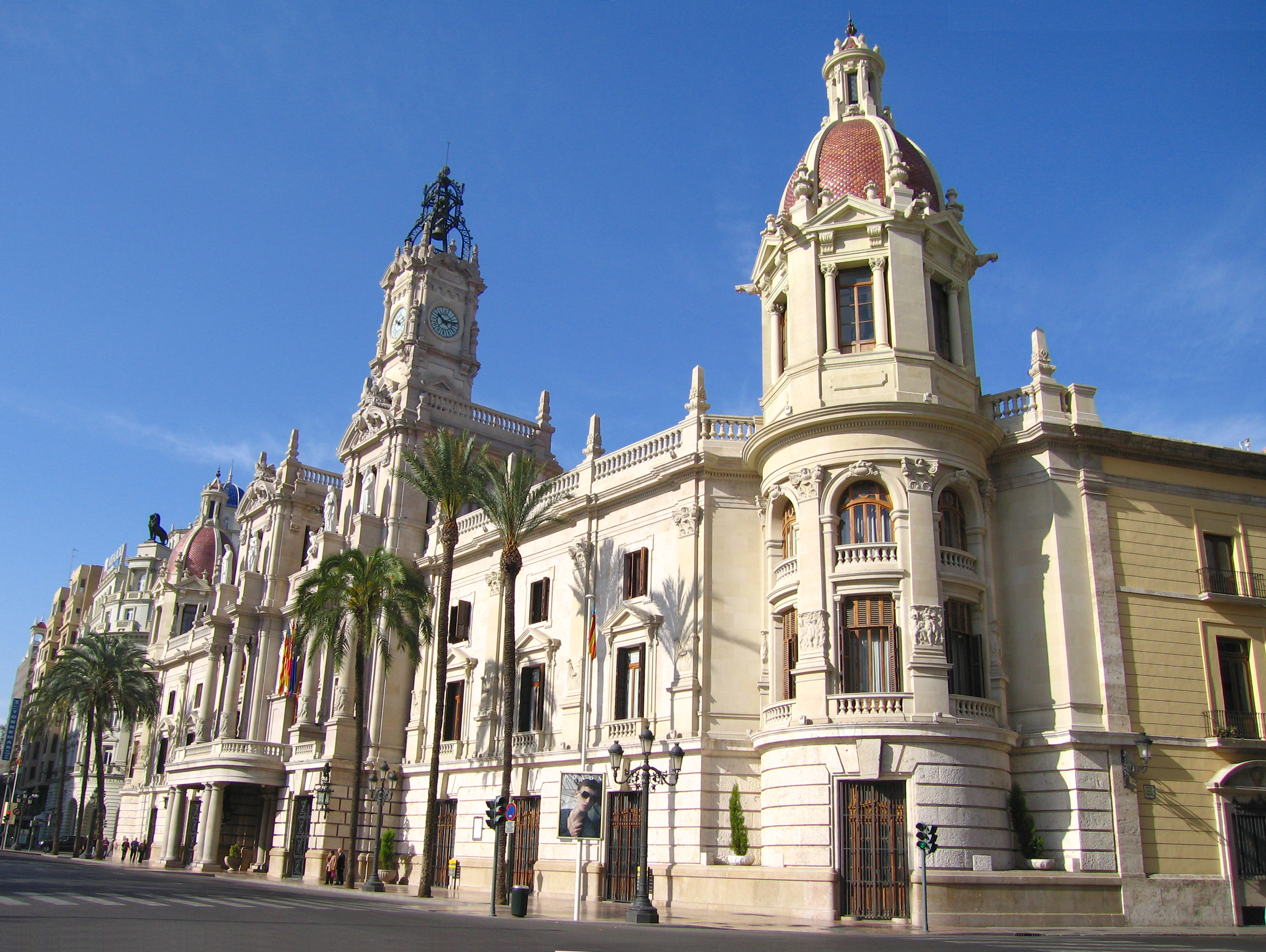 Ajuntament de València